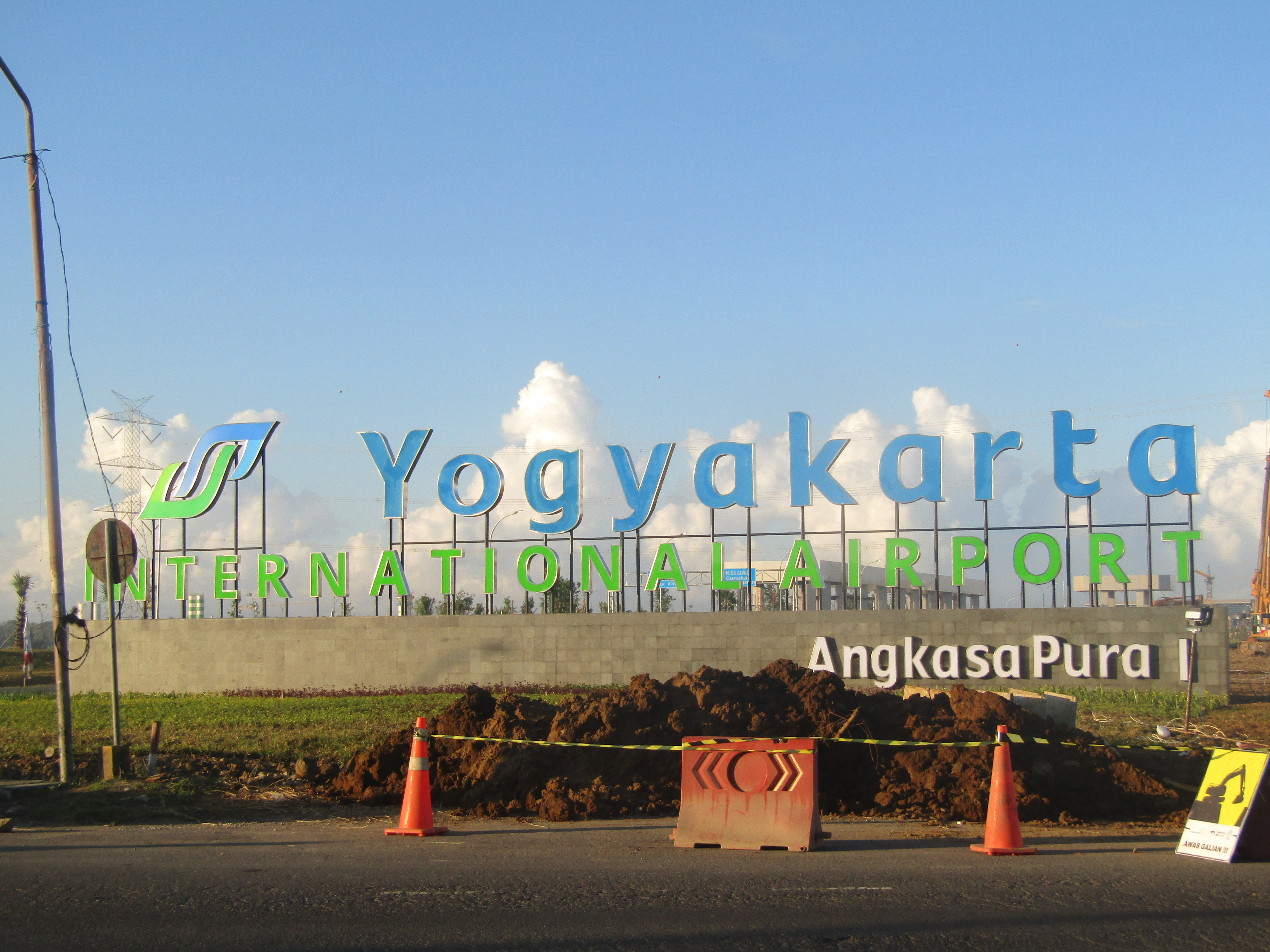 Tampak depan balok nama YIA